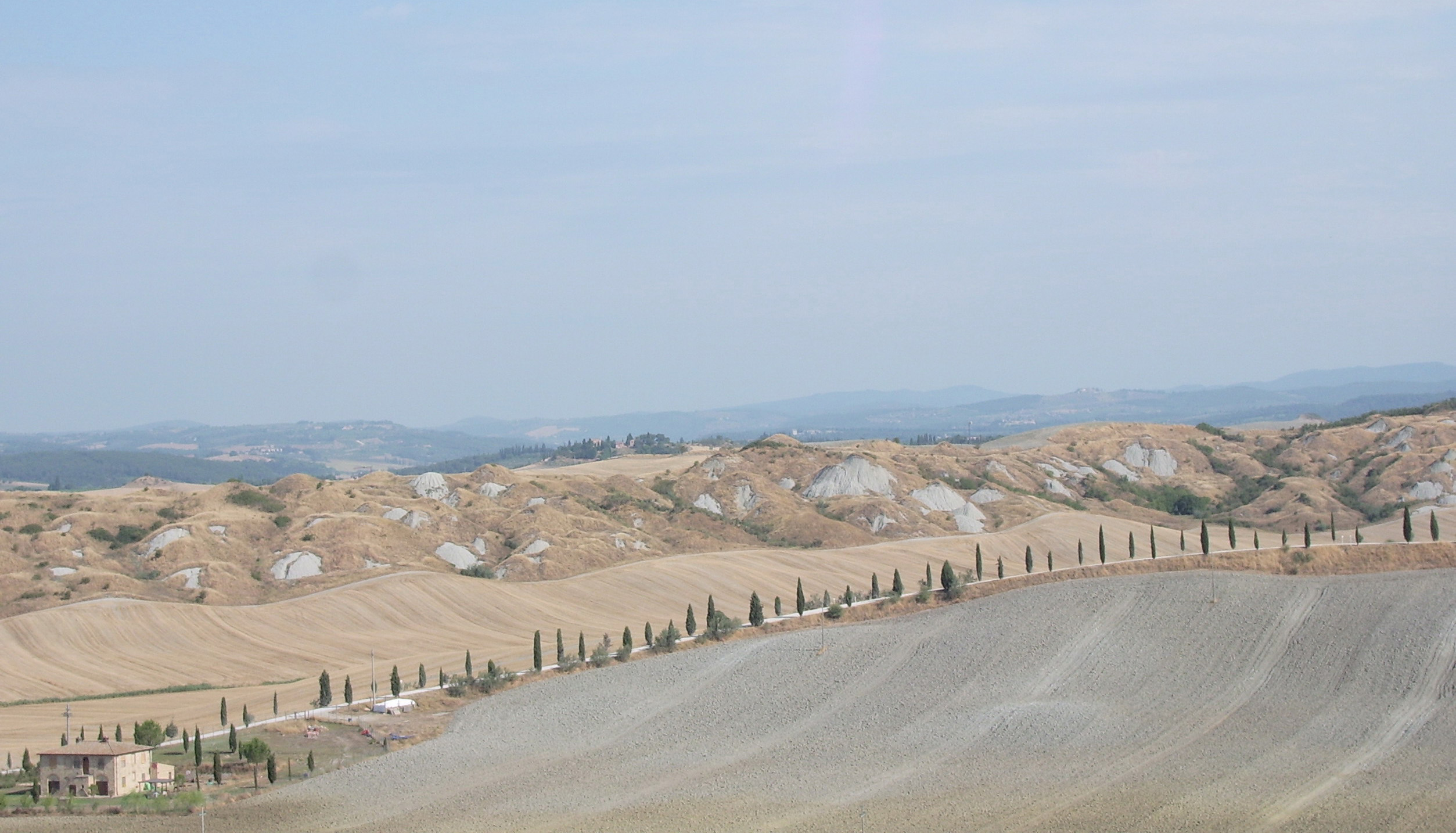 Désert d'Accona recadré